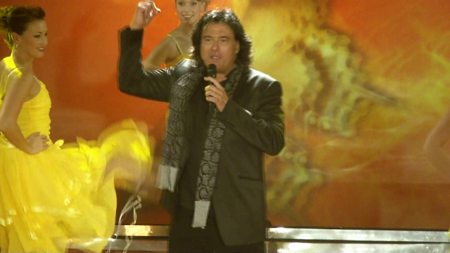 Andreas Martin 2010